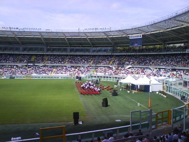 Assemblea internzionale dei testimoni di geova 2009 a Torino